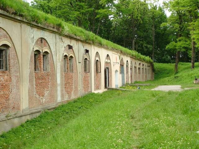 Fort VIII Łętownia - fort artyleryjski Twierdzy Przemyśl